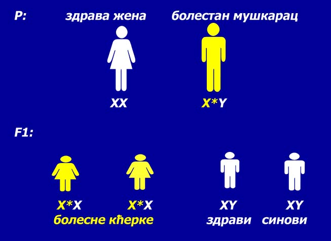 аутор: Снежана Трифуновић